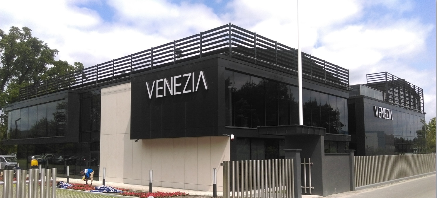 Siedzina Venezia